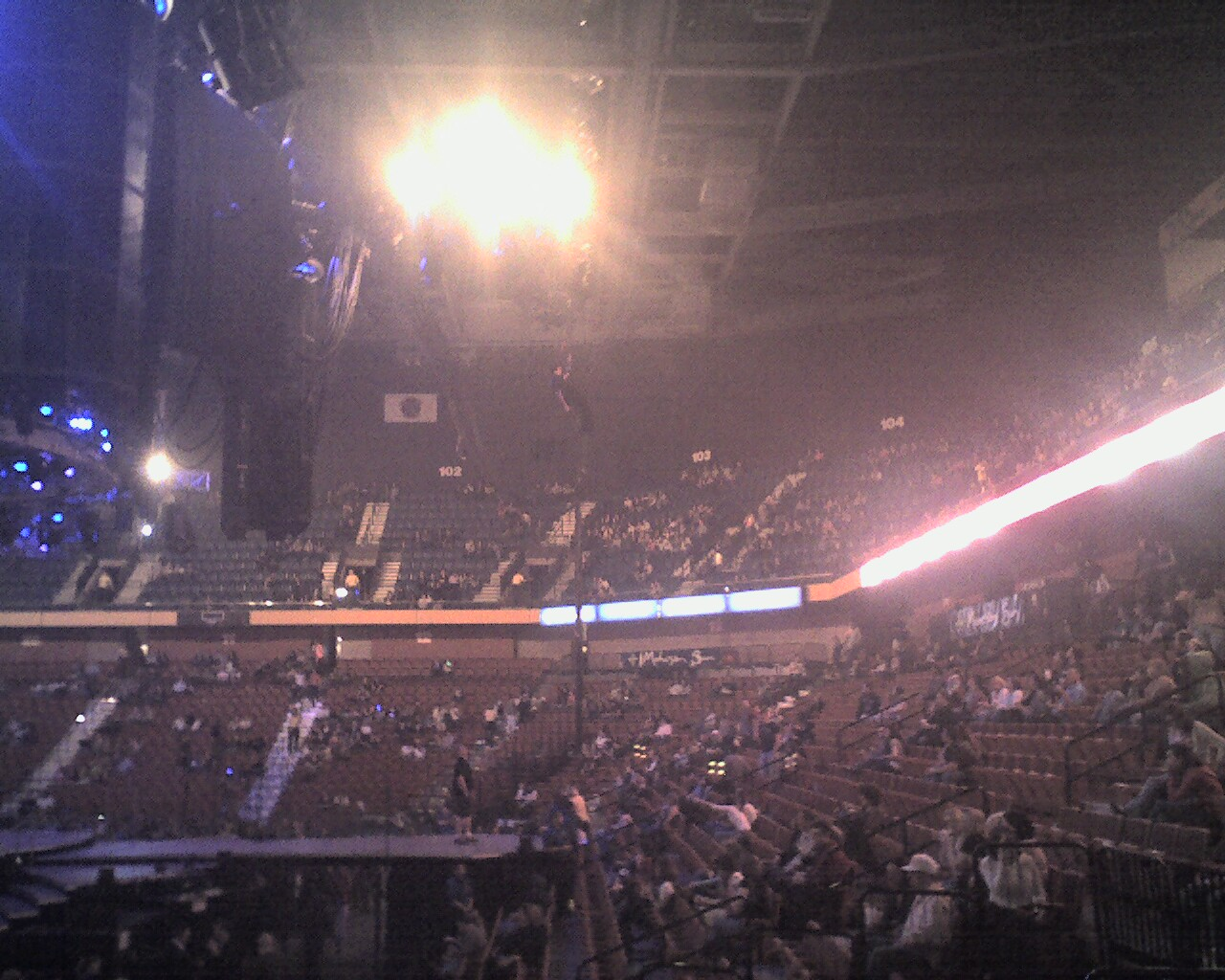 Vue intérieure de la Mohegan Sun Arena lors d'un concert de Justin Timberlake le 24 mars 2007.